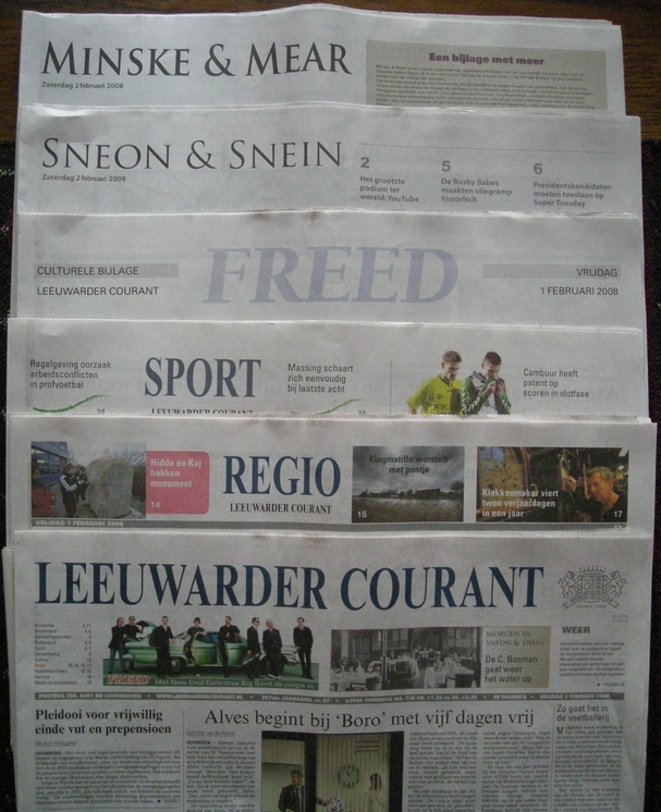 Leeuwarder Courant (voorpagina en bijlagen)